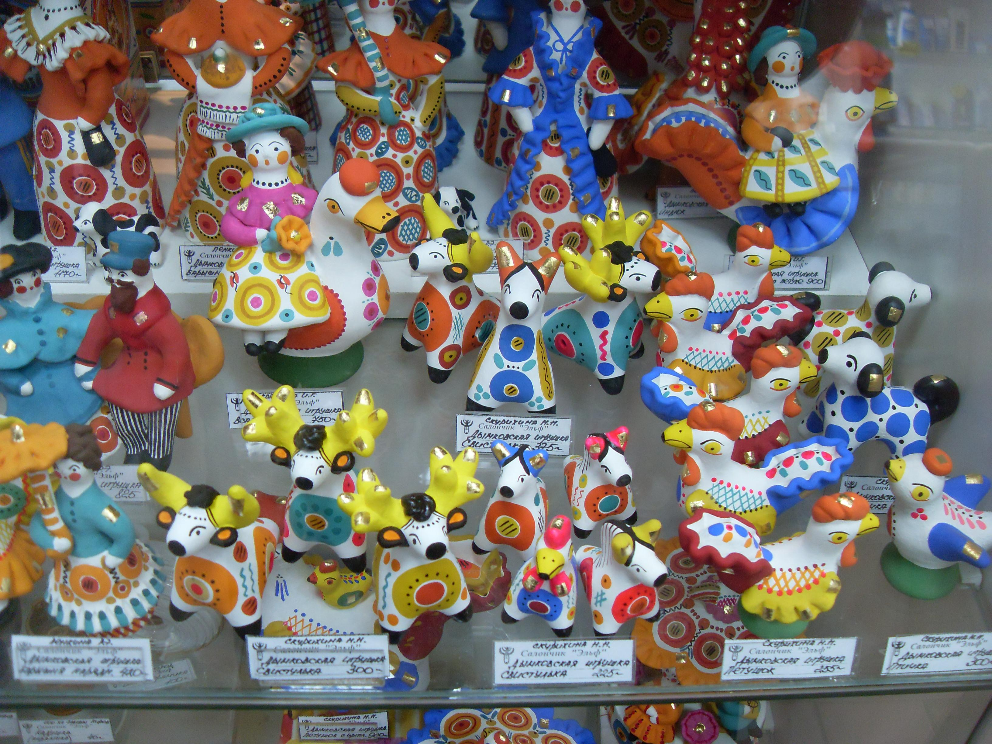 Дымковская игрушка в магазине г. Киров (Кировская область)